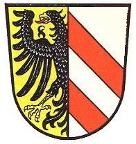 Wappen der Familie Bethmann (1530) bzw. Bethmann-Hollweg (1780)